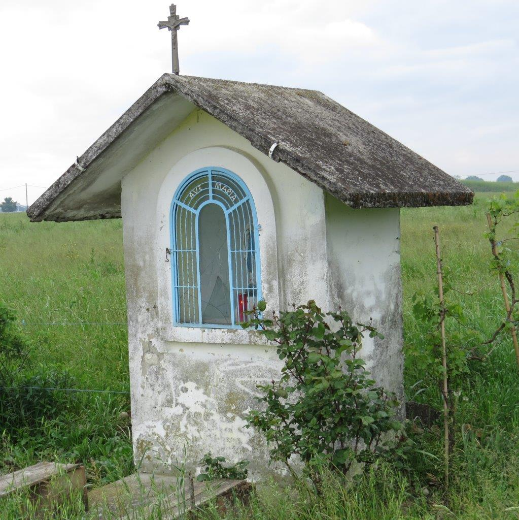 Situato nelle campagne nei pressi della frazione Bersano